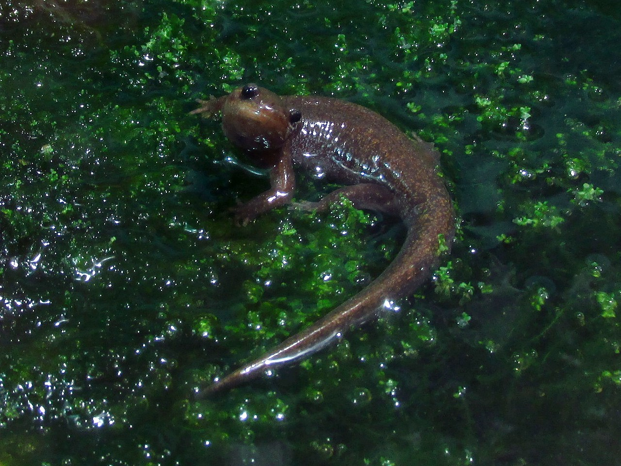 トウホクサンショウウオ 浅虫水族館展示